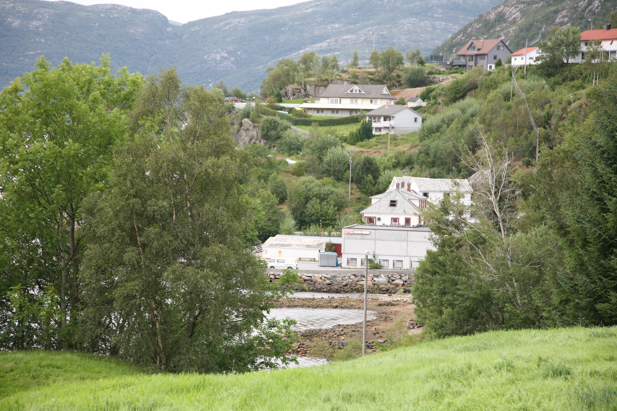 Dalsøyra Gulen Norway